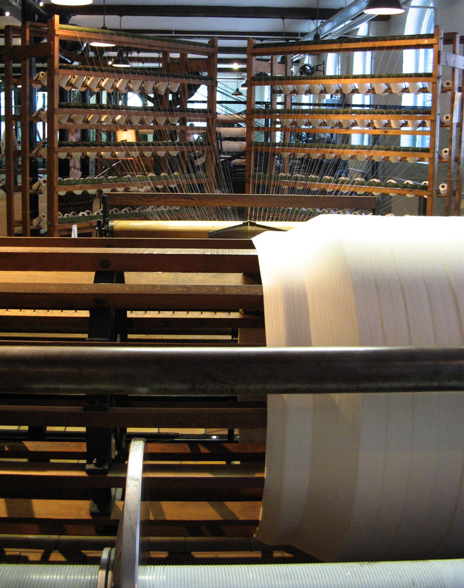 Kettingscheermachine met scheerriet en klossenrek, Gebr. Sucker (Grünberg), ca 1900 (03484) kettingscheermachine + klossenrek